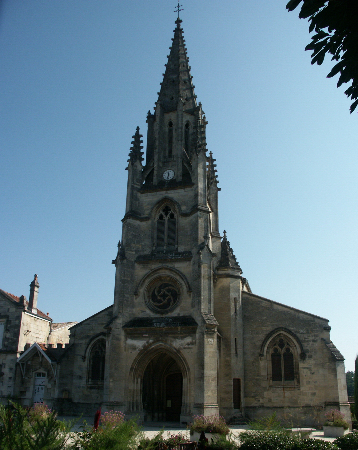 Eglise Saint-Vincent à Floirac (Gironde, France).